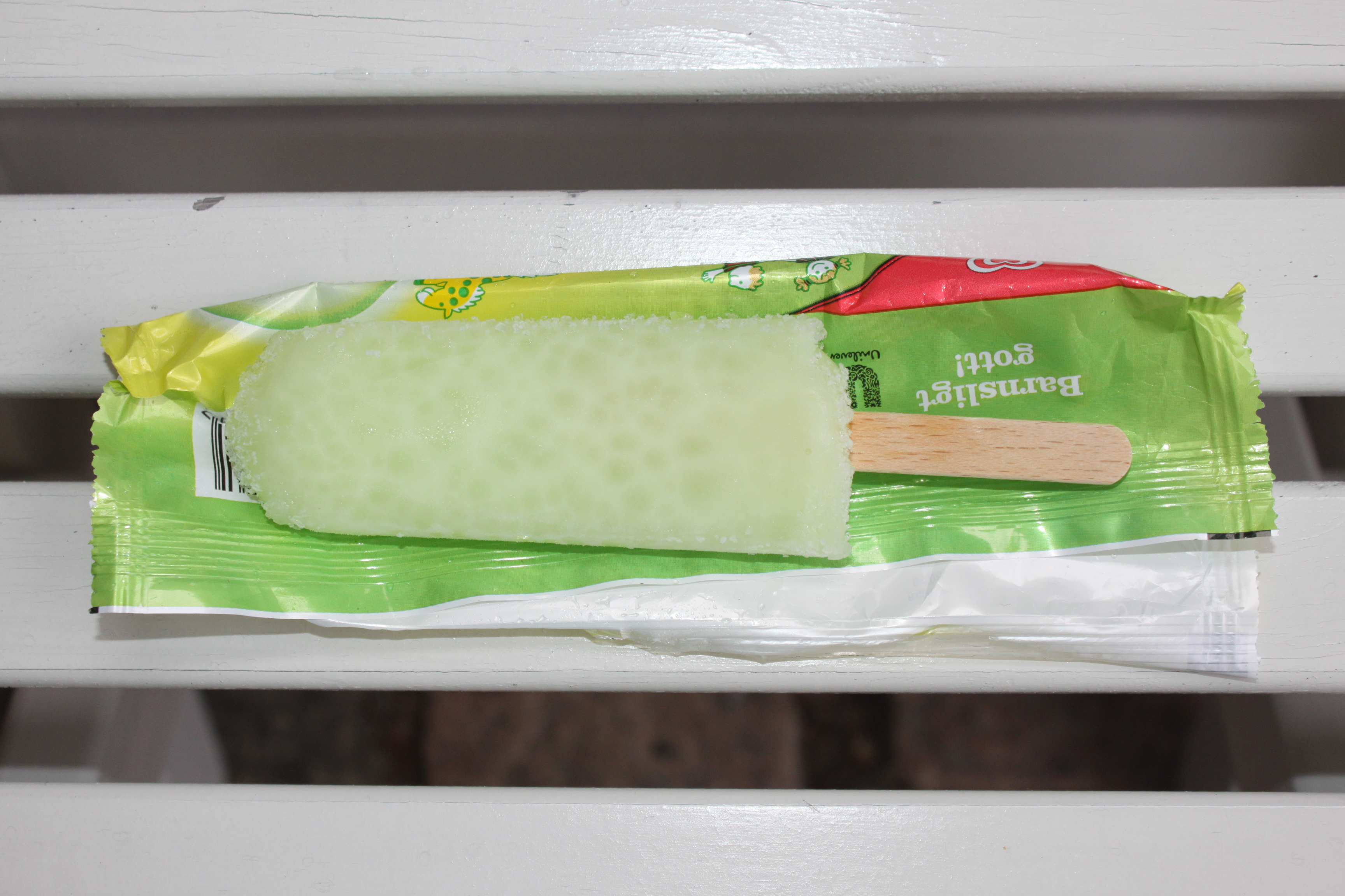 Isglassen Piggelin, 28 juli 2013.